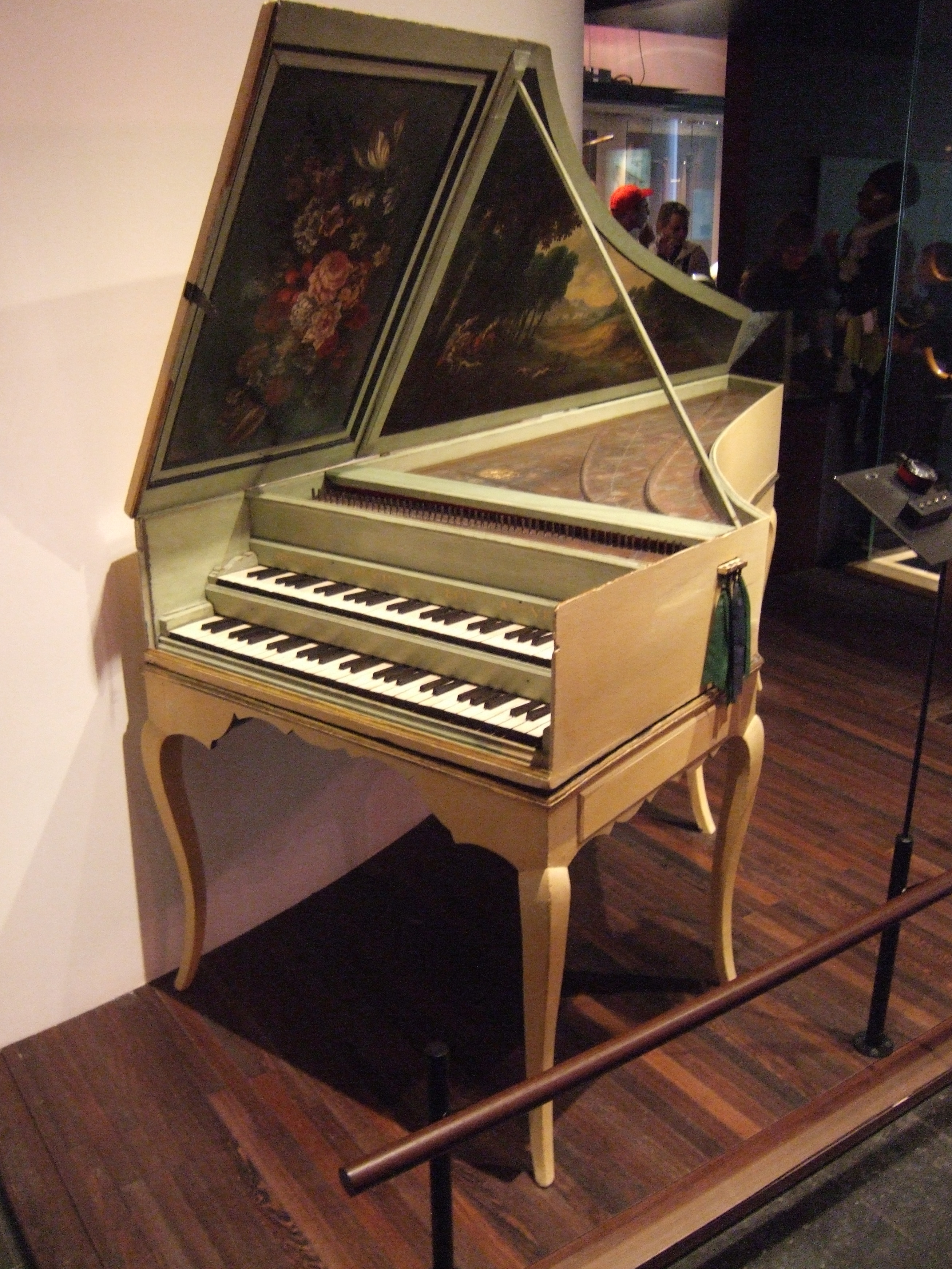 Clavecin par Ioannes Couchet (1646, ravalé probablement au XVIIIe siècle) - Bruxelles, Musée des Instruments de Musique